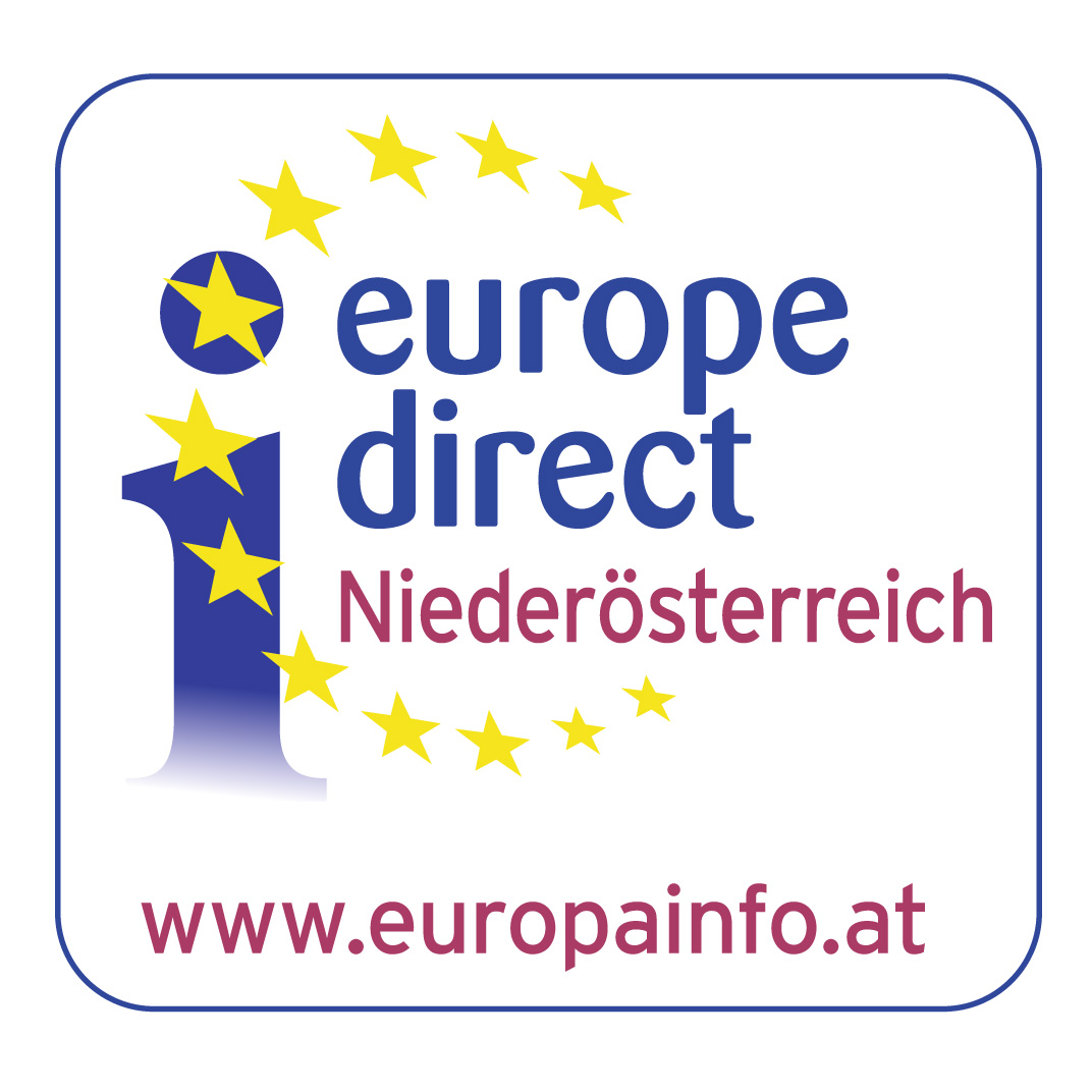 Logo der EuropeDirect Infostelle des Landes NÖ